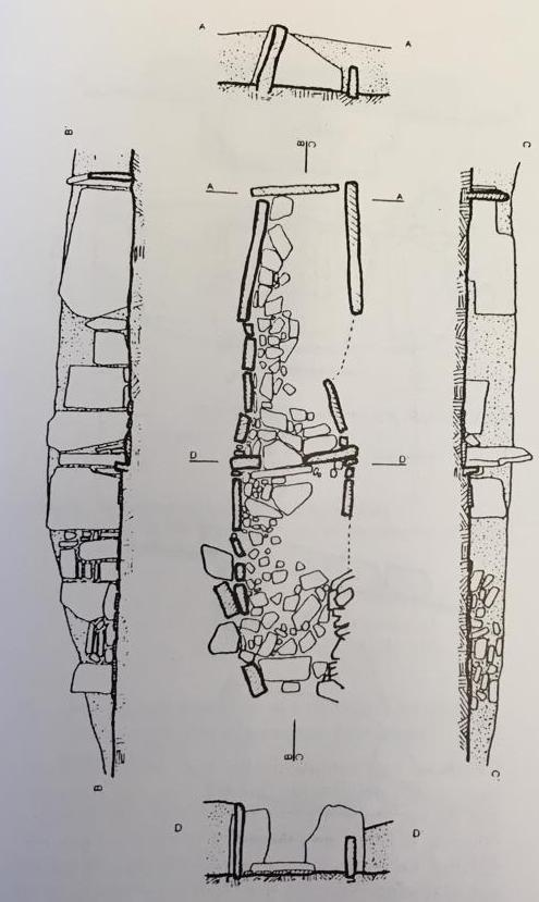 Un dibuix inèdit de J.Mestres